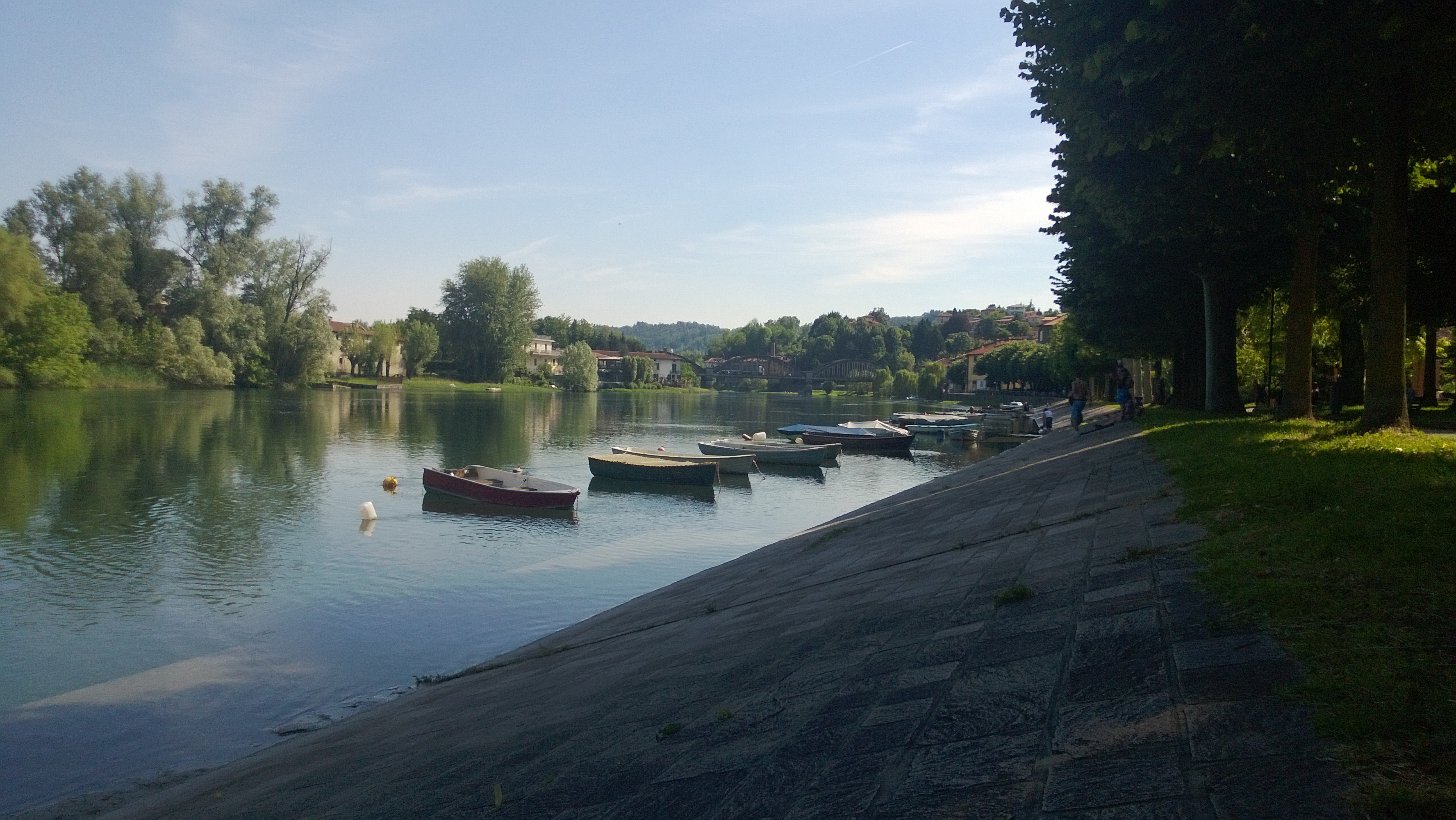 Alta Brianza Lecchese